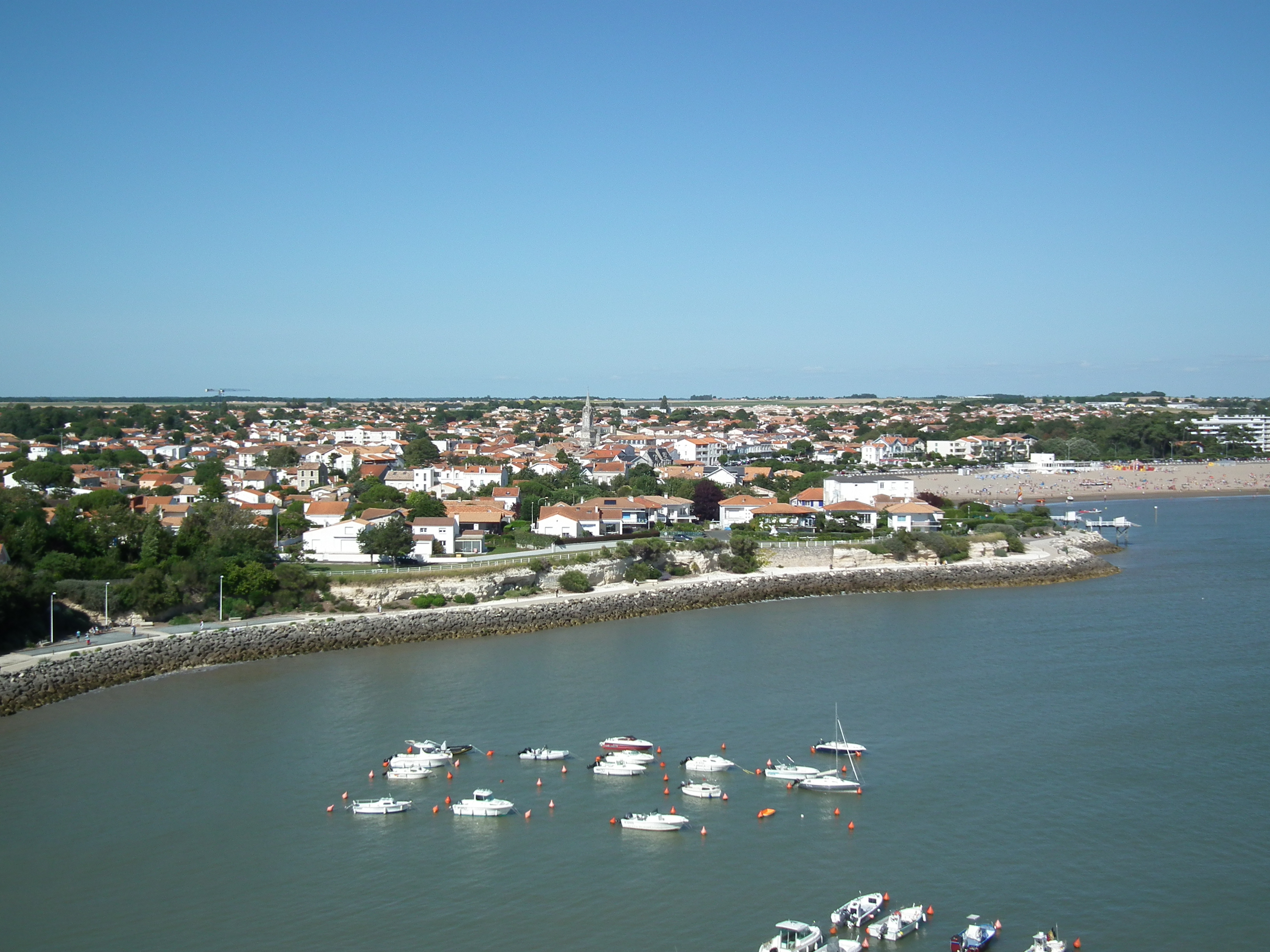 Vue de Saint-Georges-de-Didonne depuis le phare de Vallières